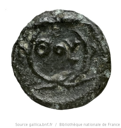 ΘΟΥ μέσα σε στεφάνη από στάχυα